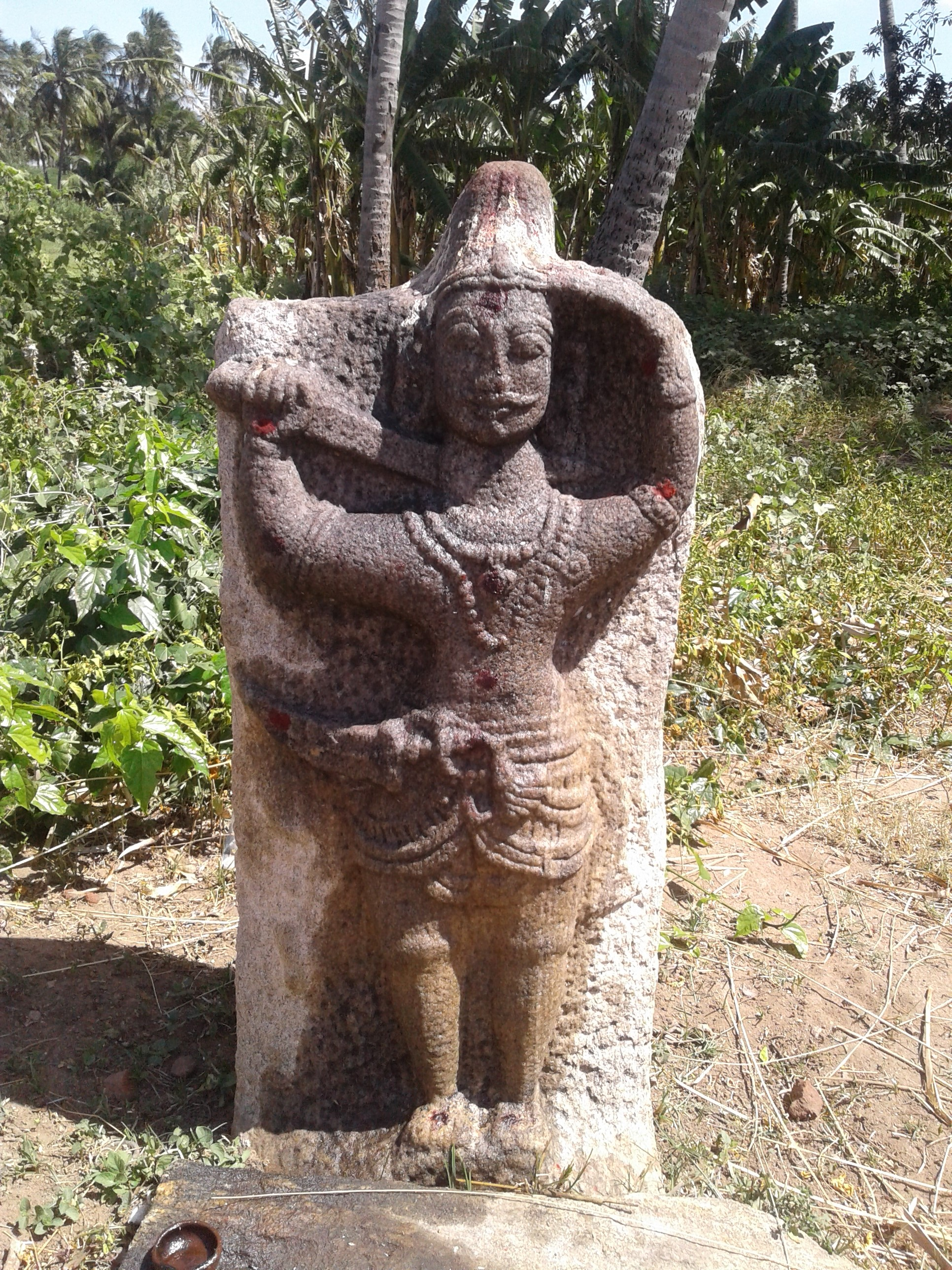 வாலீசுவரர் கோயில் அயிலூர்